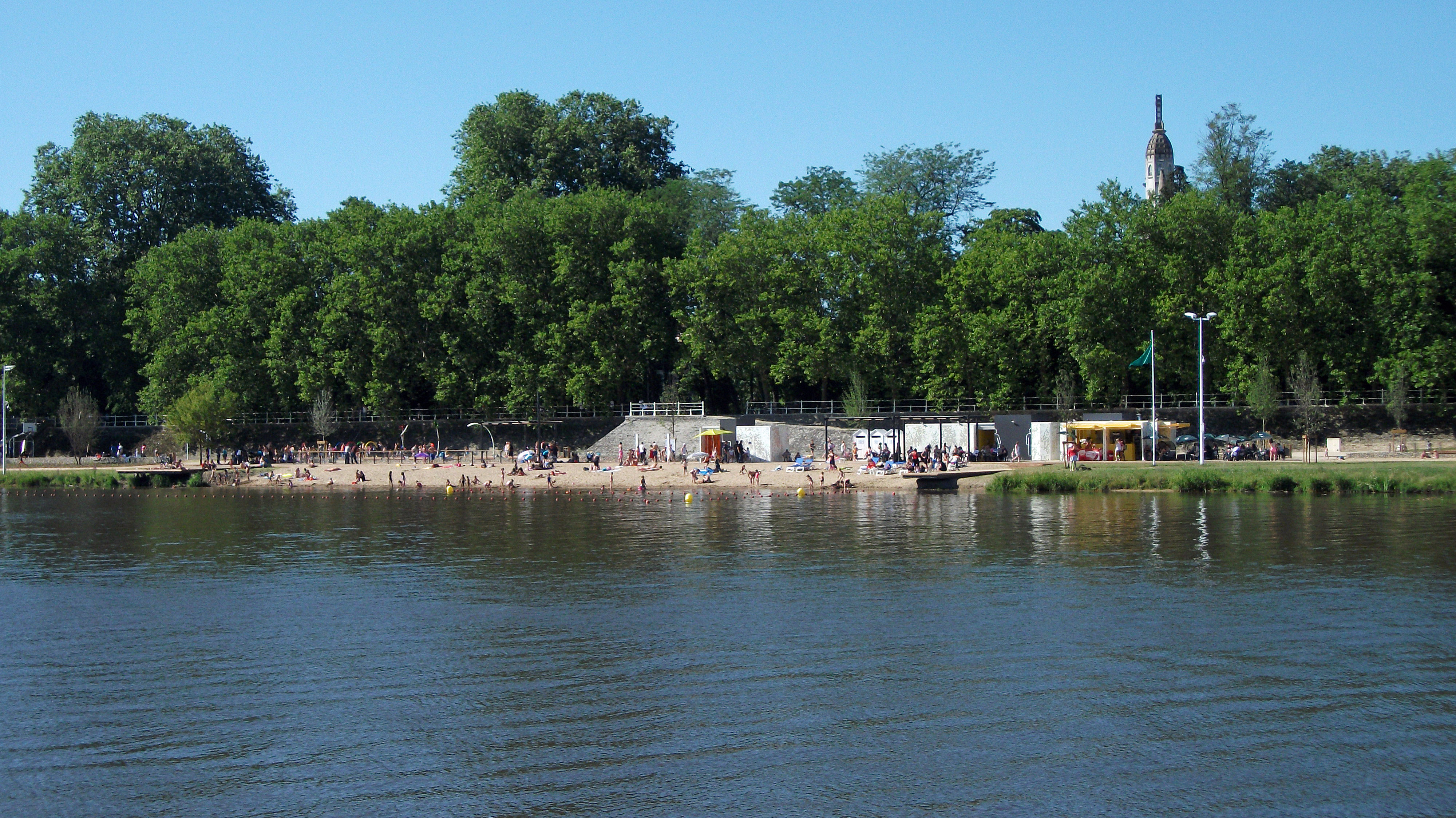 Plage des Célestins sur la commune de Vichy, photo prise depuis la rive gauche, commune de Bellerive-sur-Allier